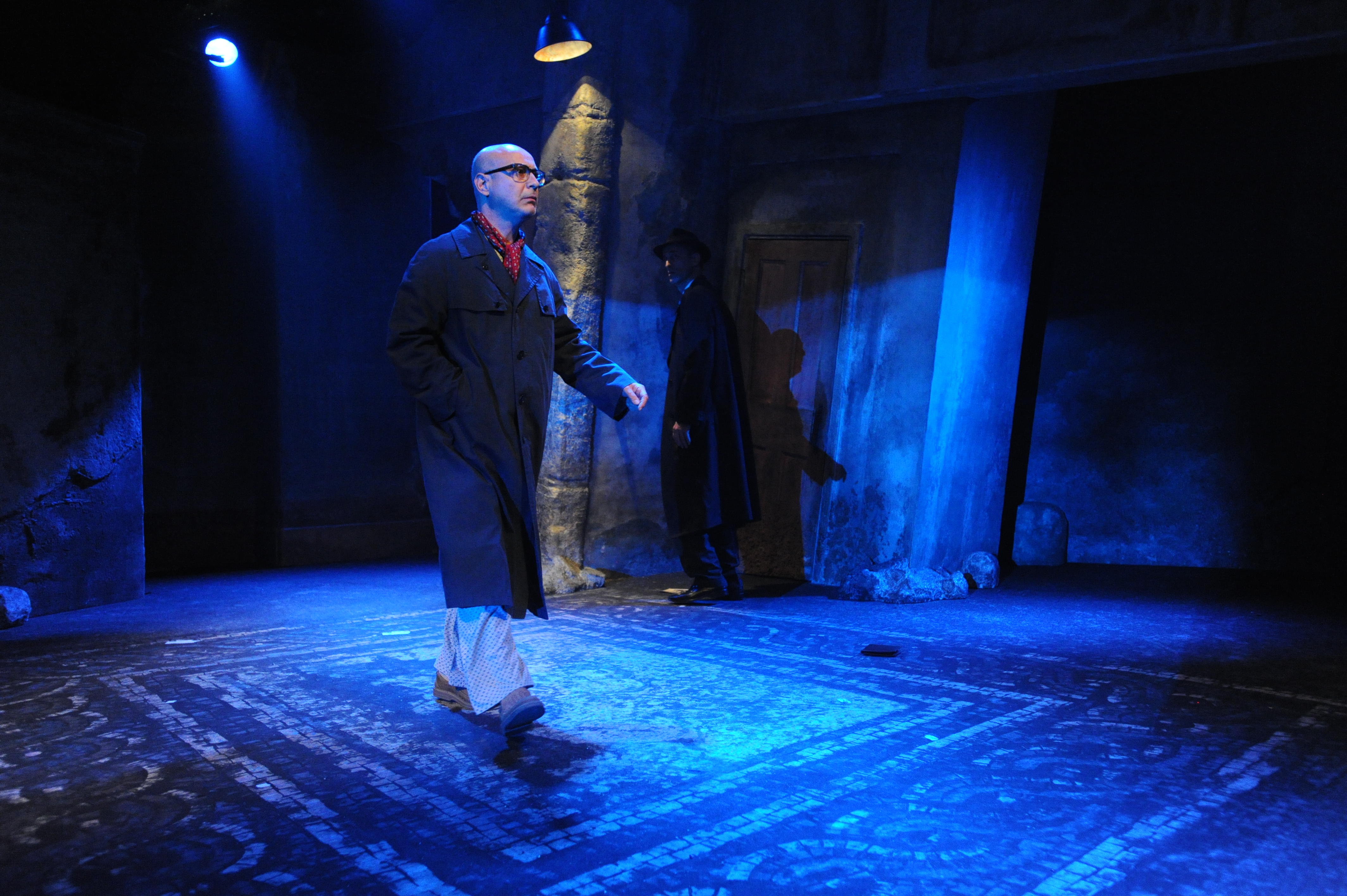 ארז שפריר וניר רון בהצגה "חוקר פרטי", מאת ובבימויו של מיקי גורביץ', תיאטרון החאן